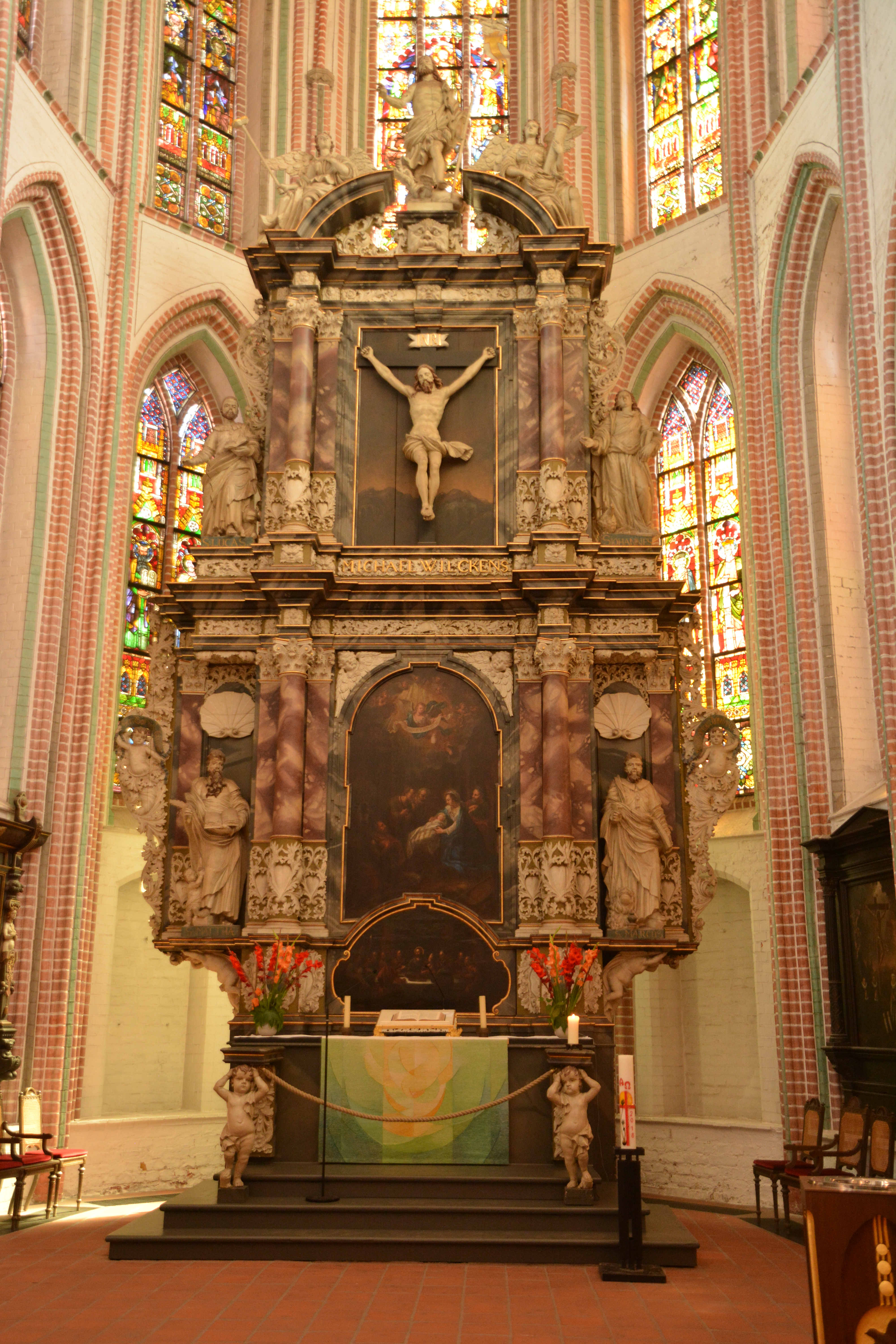 Hauptaltar St. Petri Buxtehude